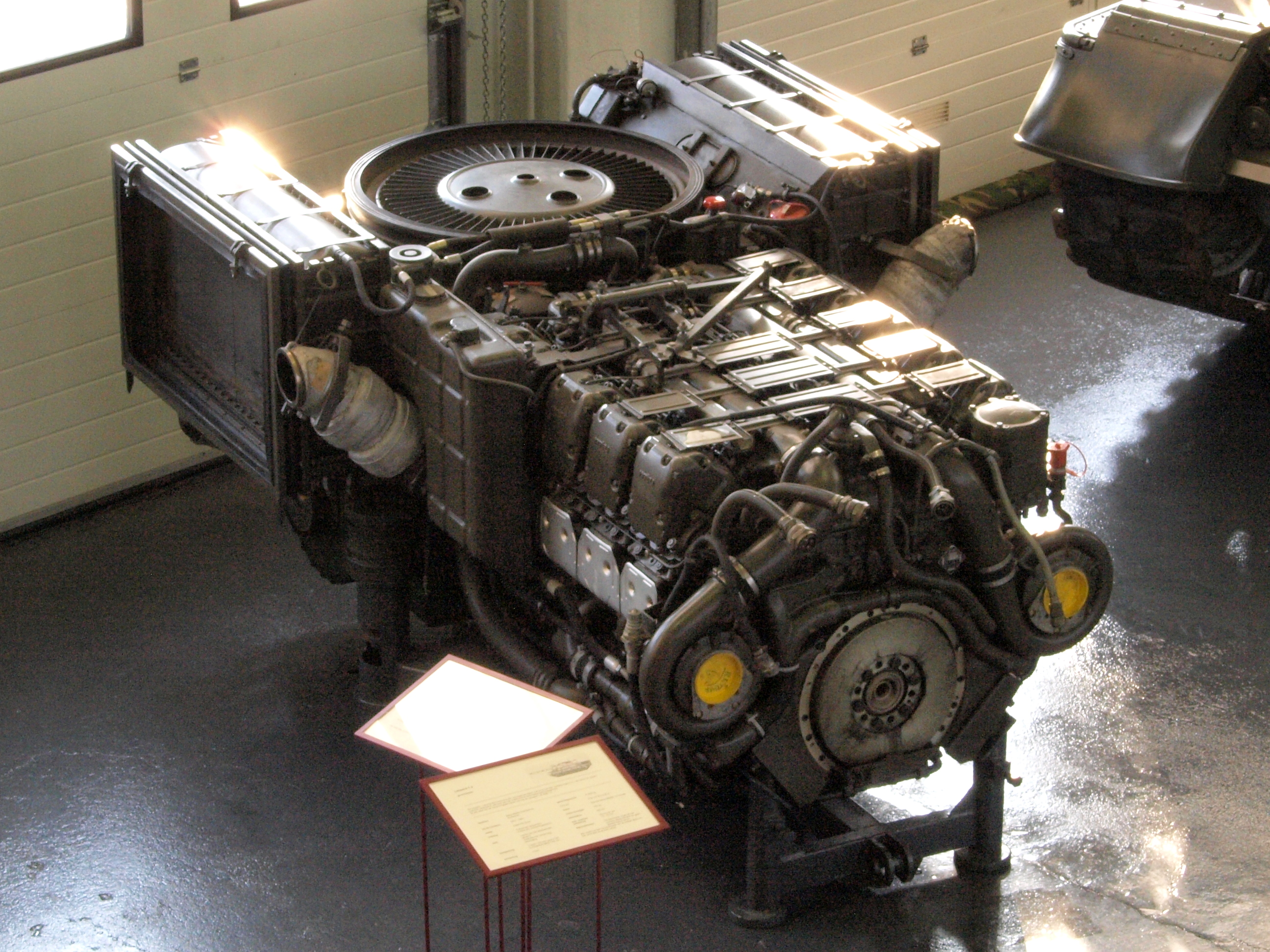 Leopard 1 Power-pack